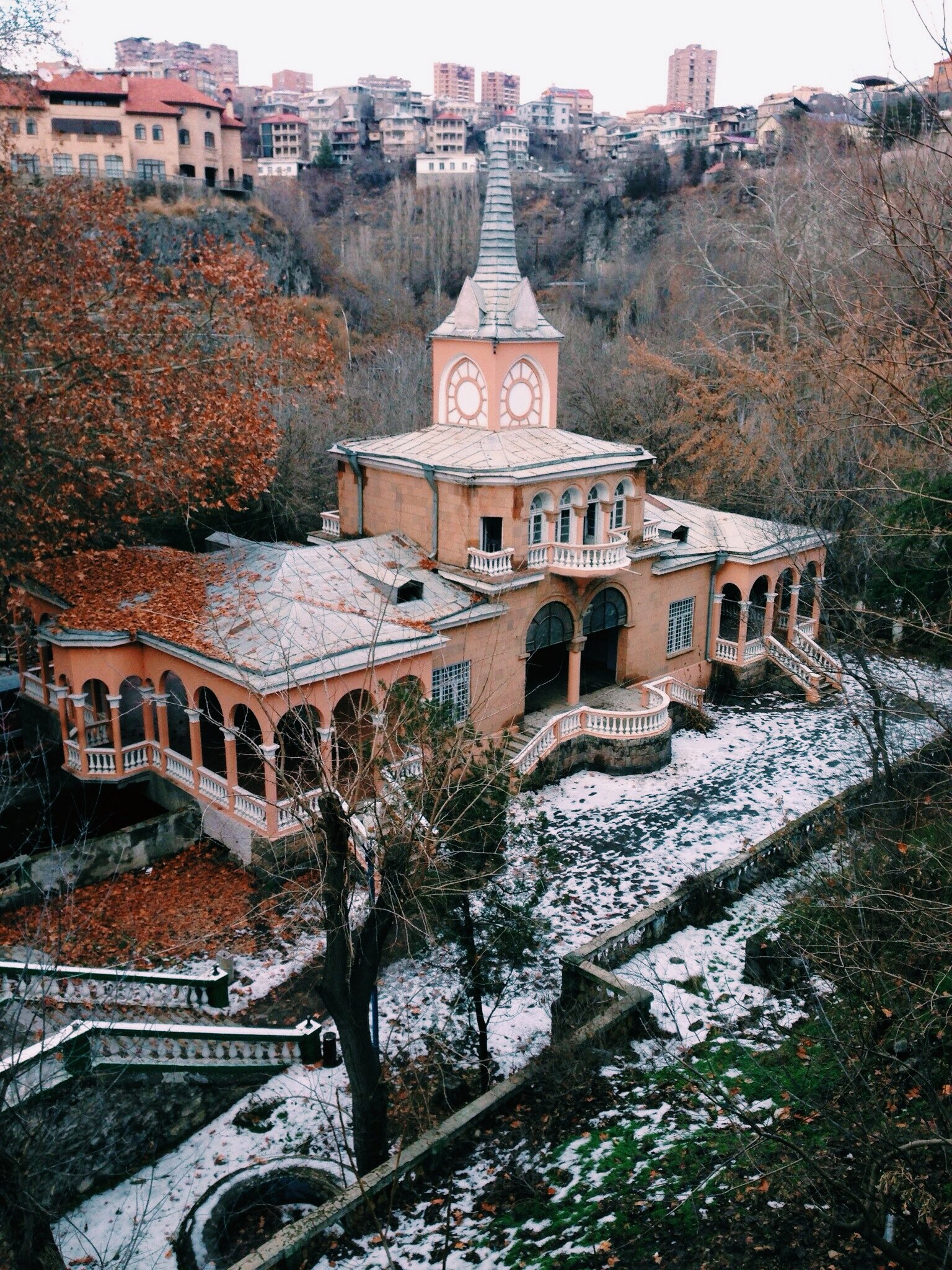 Մանկական երկաթուղի, Երևան